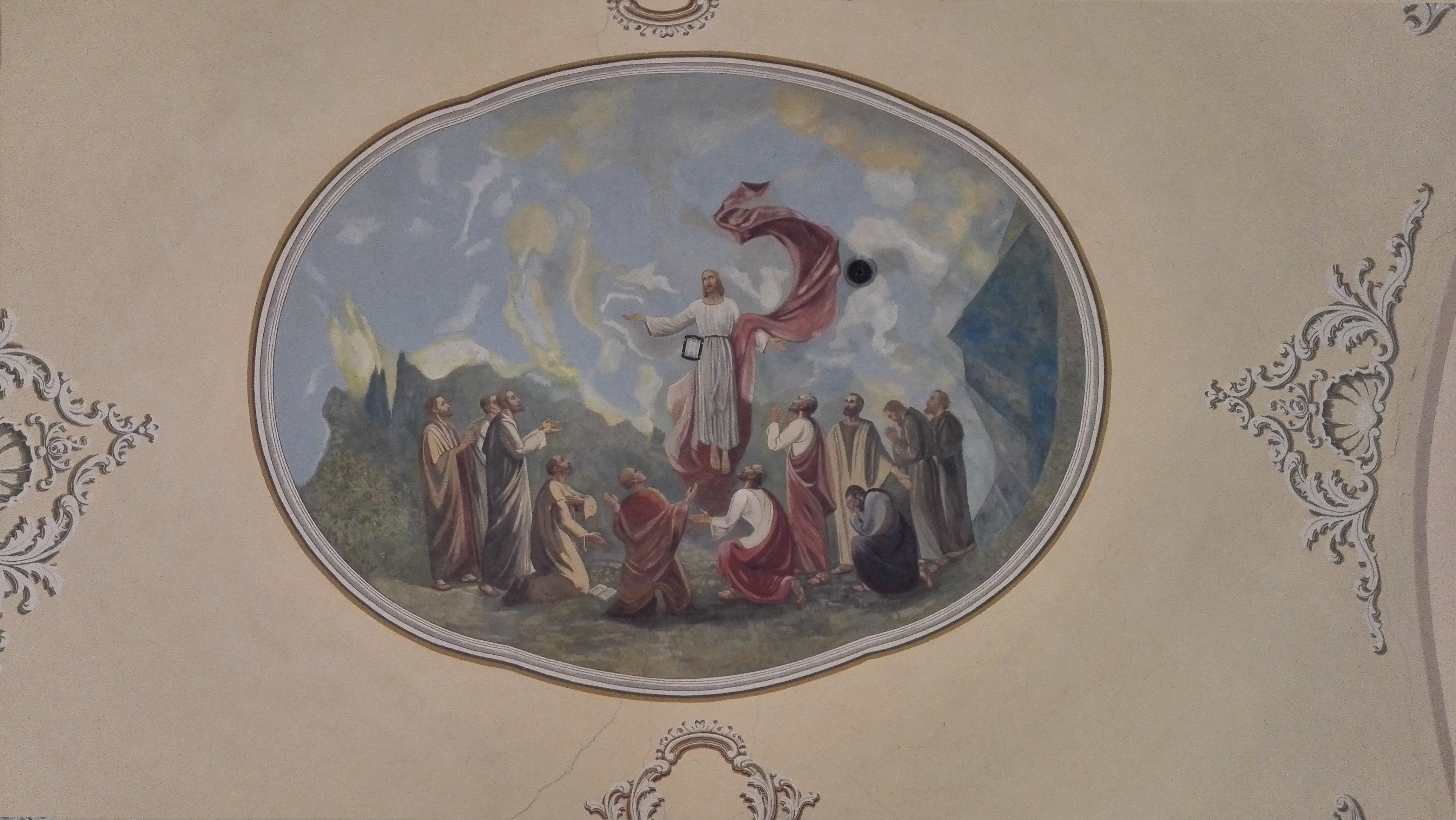 Nanebovstúpenie Ježiša Krista, maľba z rokov 1964-1966.